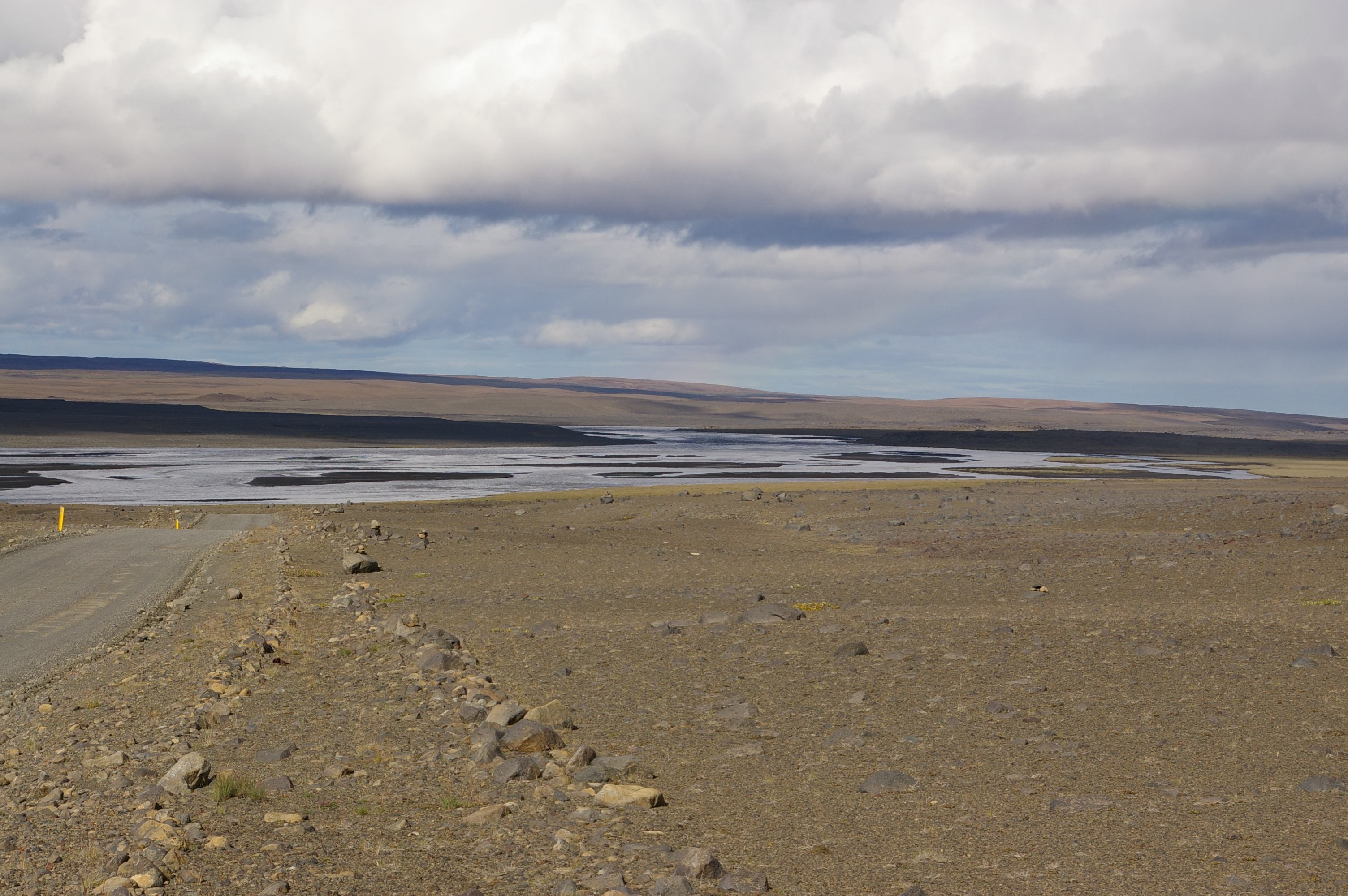 Jökulsá á Fjöllum before Sellfoss